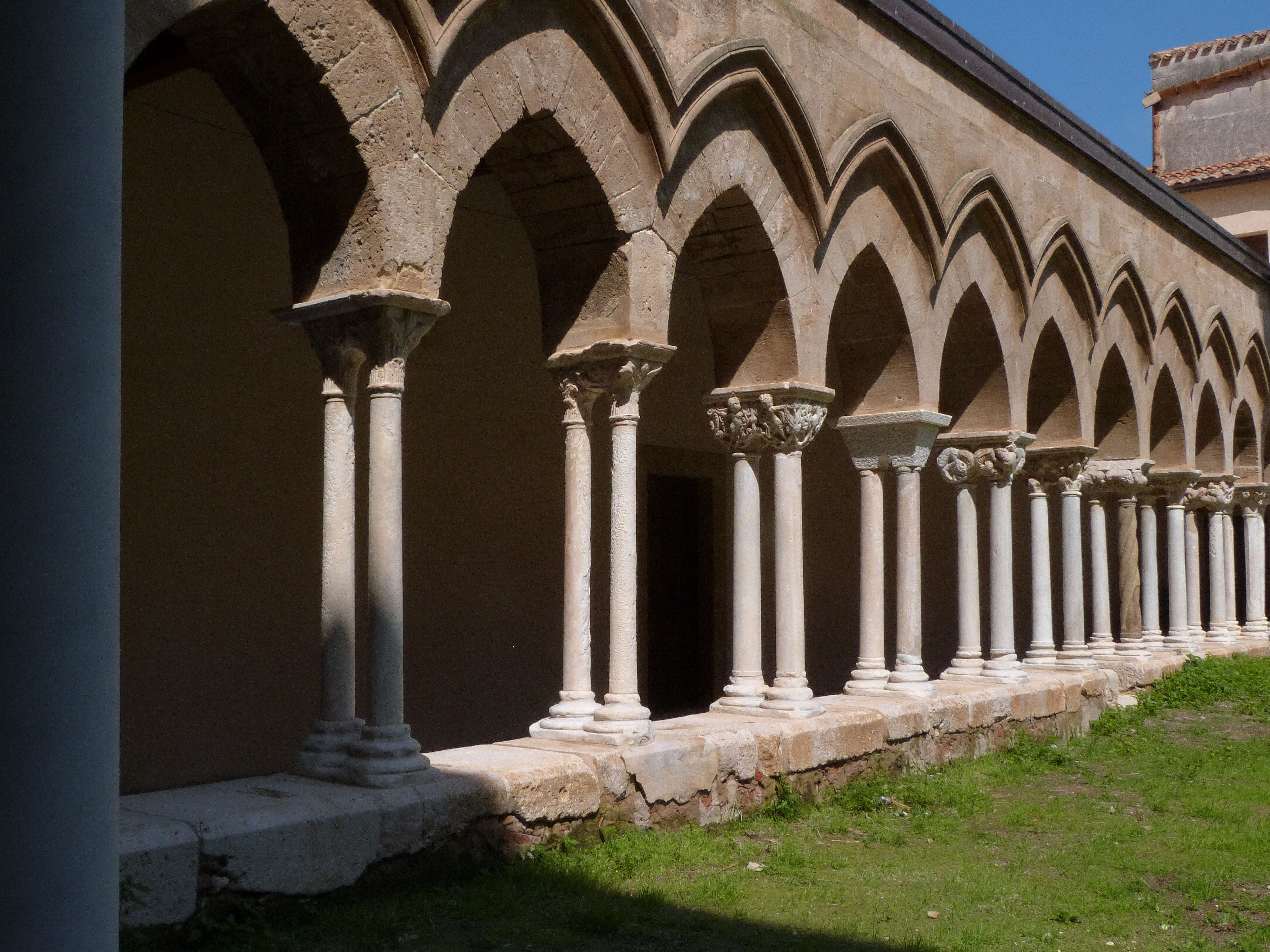 Kreuzgang am Dom von Cefalú